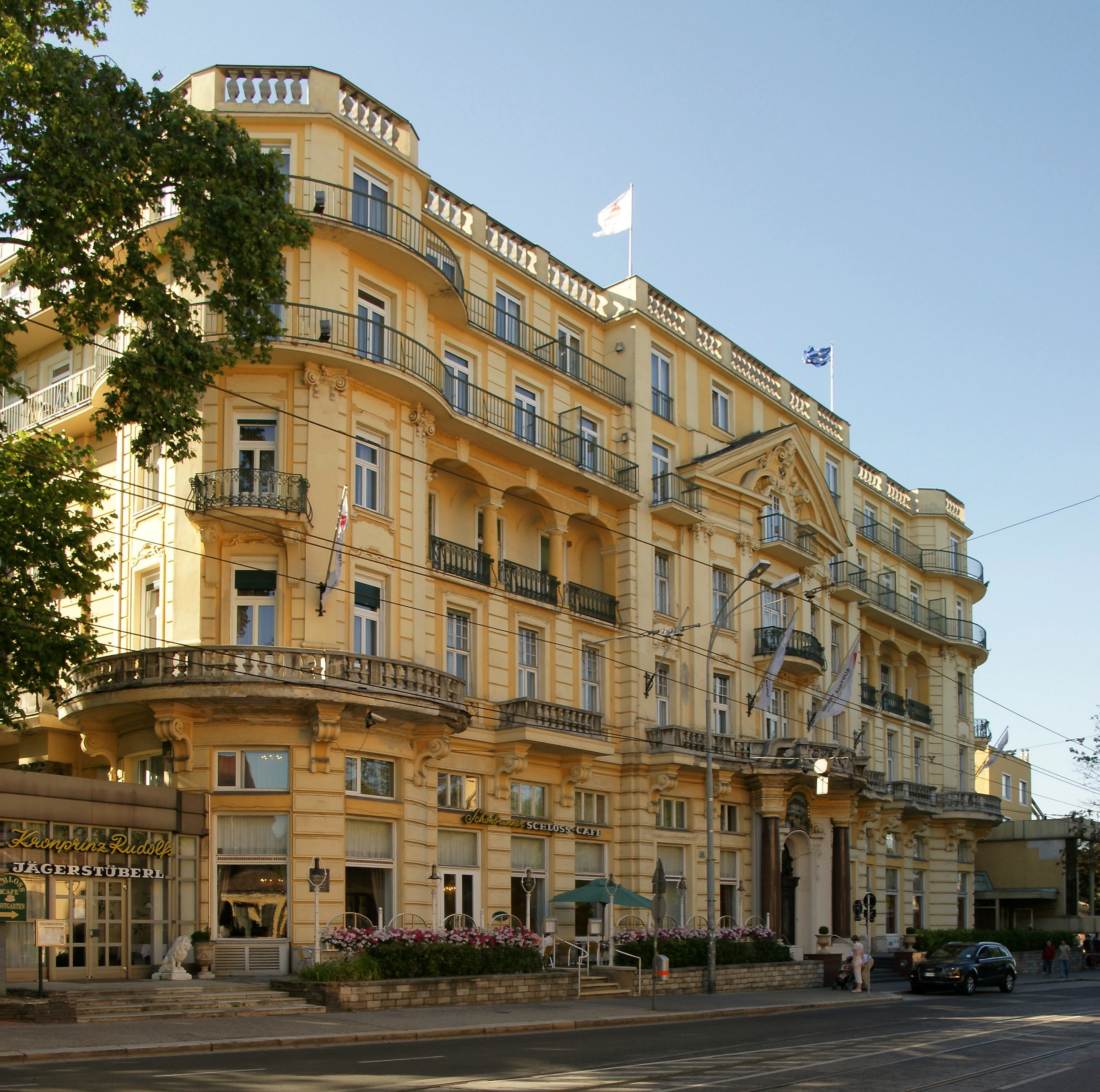 Das Parkhotel Schönbrunn befindet sich in Wien Hietzing neben dem Schönbrunner Schlosspark.